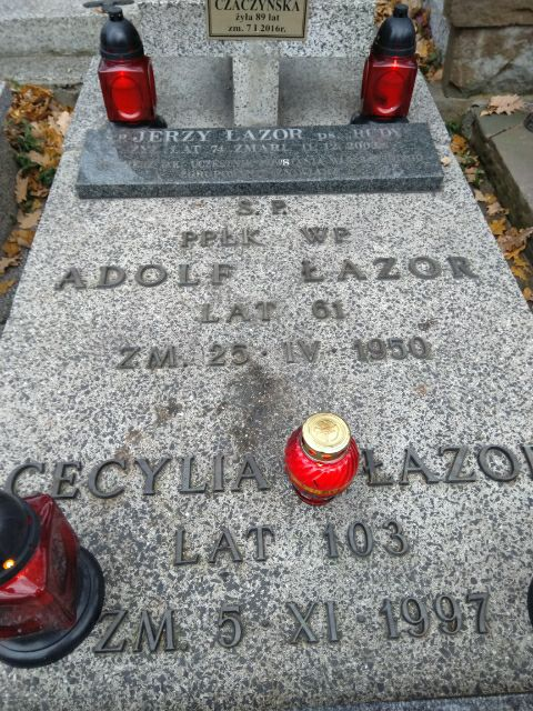 Zdjęcie nagrobka rodziny Łazorów na Cmentarzu Wojskowym na Powązkach w Warszawie przedstawiające daty śmierci ppłk WP Adolfa Łazora, jego żony Cecylii Łazor oraz ich syna Jerzego Łazora.